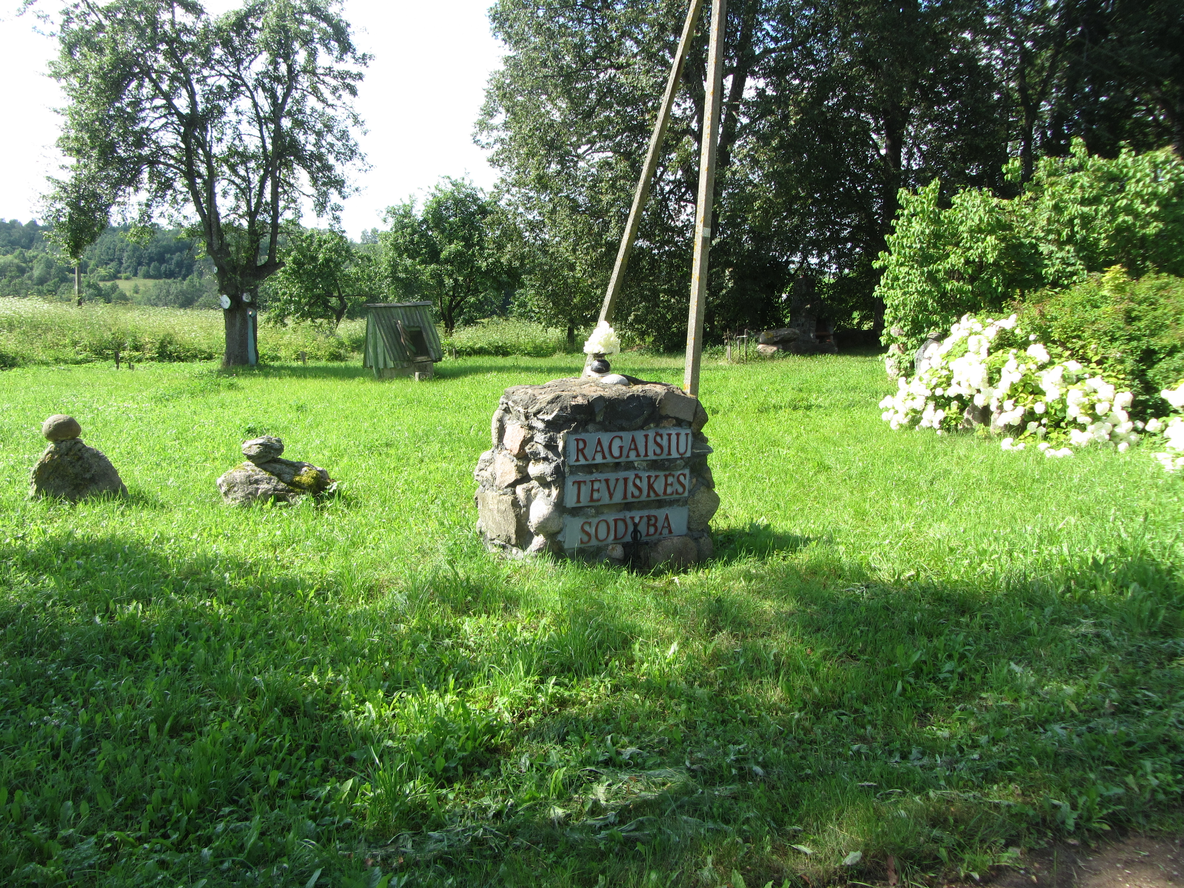 Veleikiai 32241, Lithuania